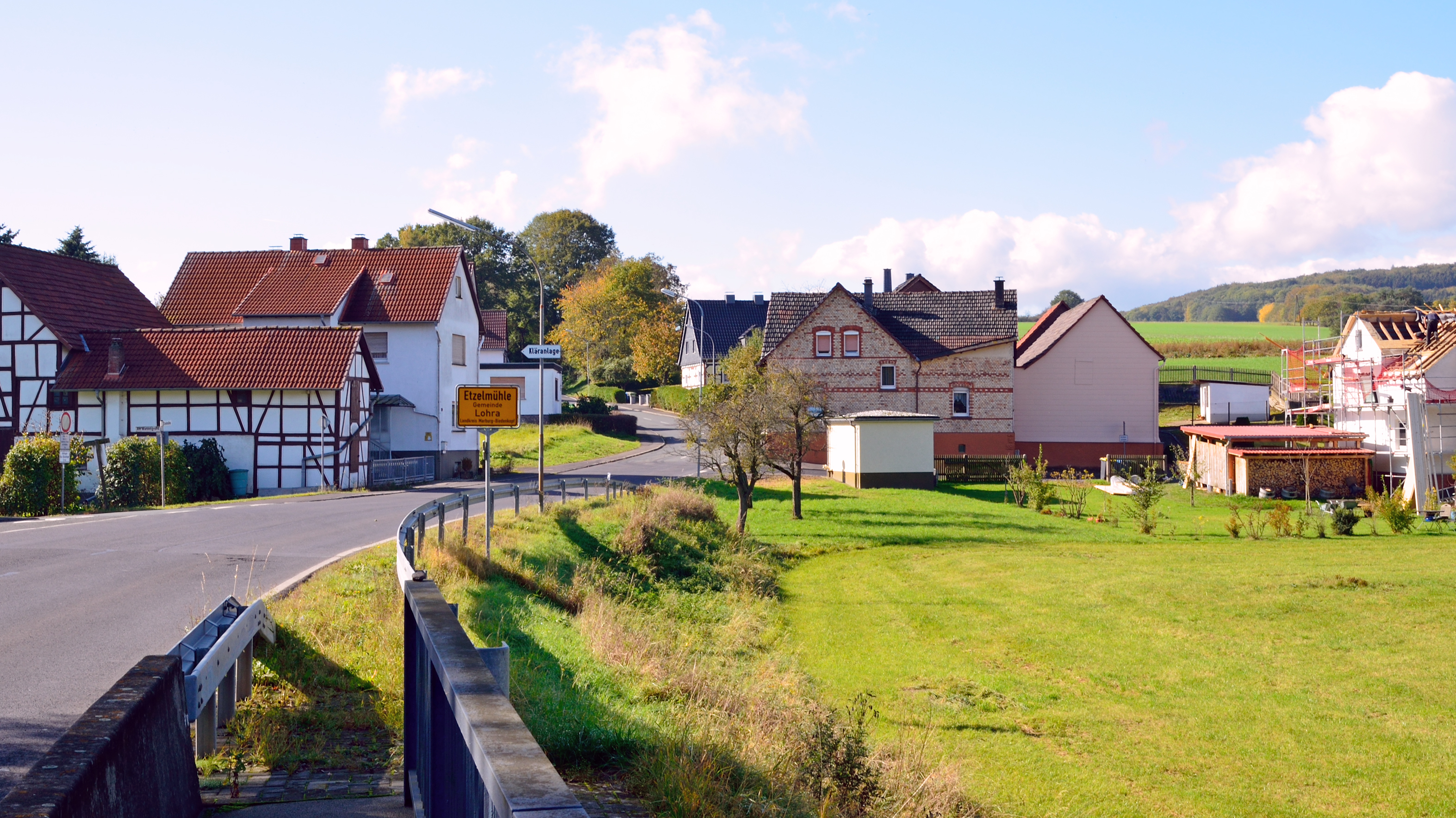 Ortseingang Etzelmühle bei Damm (Lohra)